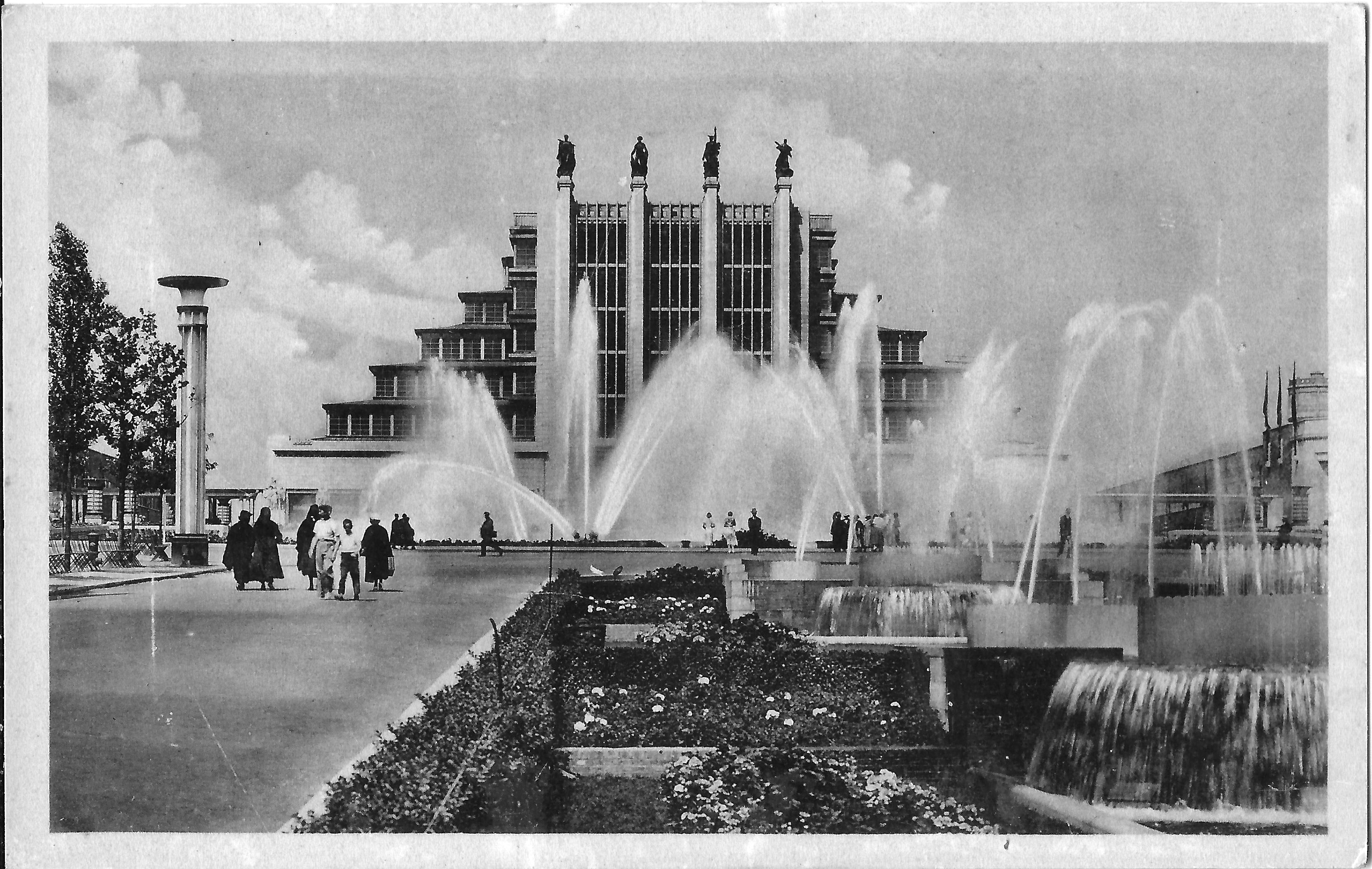 Exposition universelle de 1935 à Bruxelles (Belgique) ; les fontaines